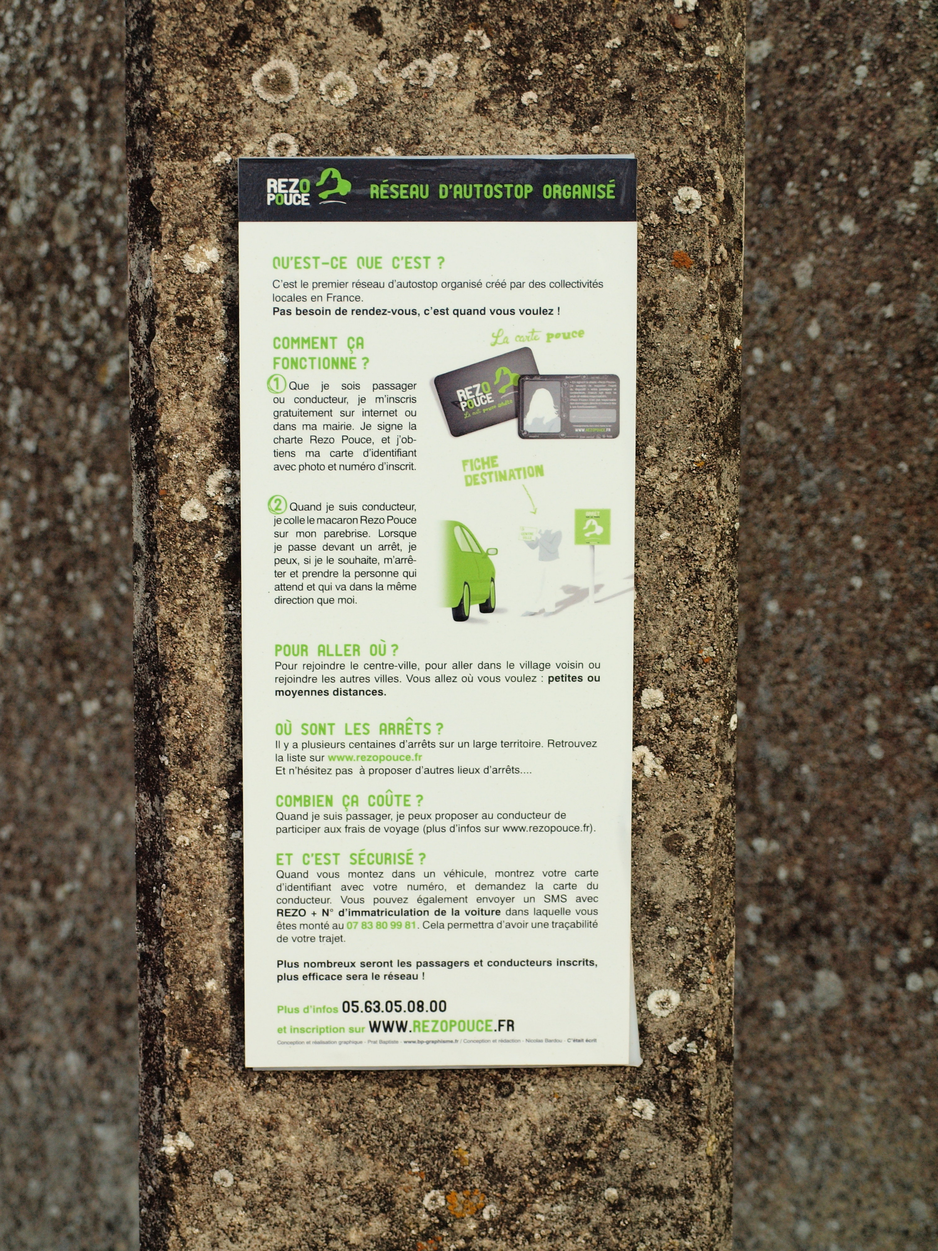 Rumont (Seine-et-Marne, France)